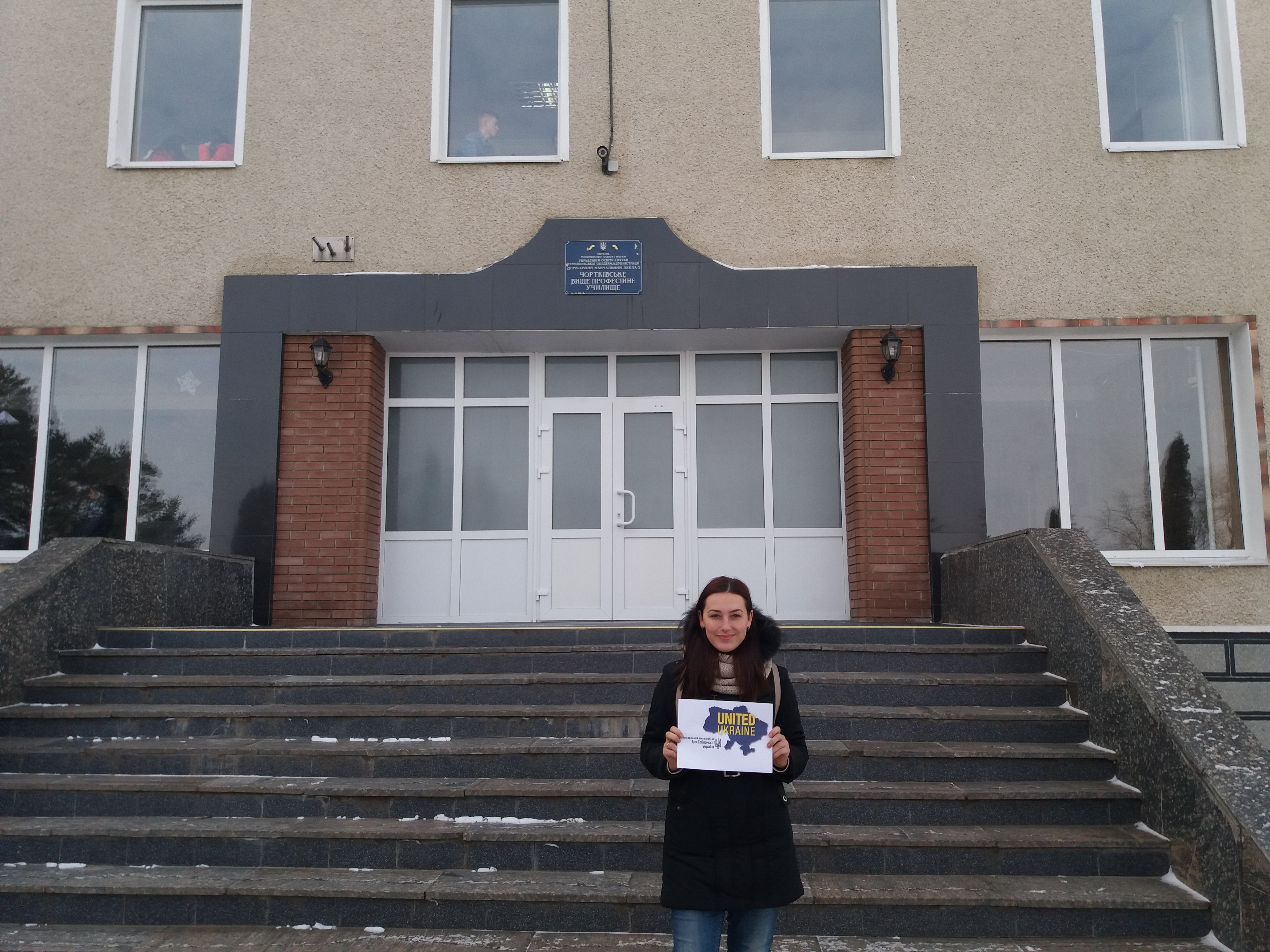 ДНЗ "Чортківське ВПУ"